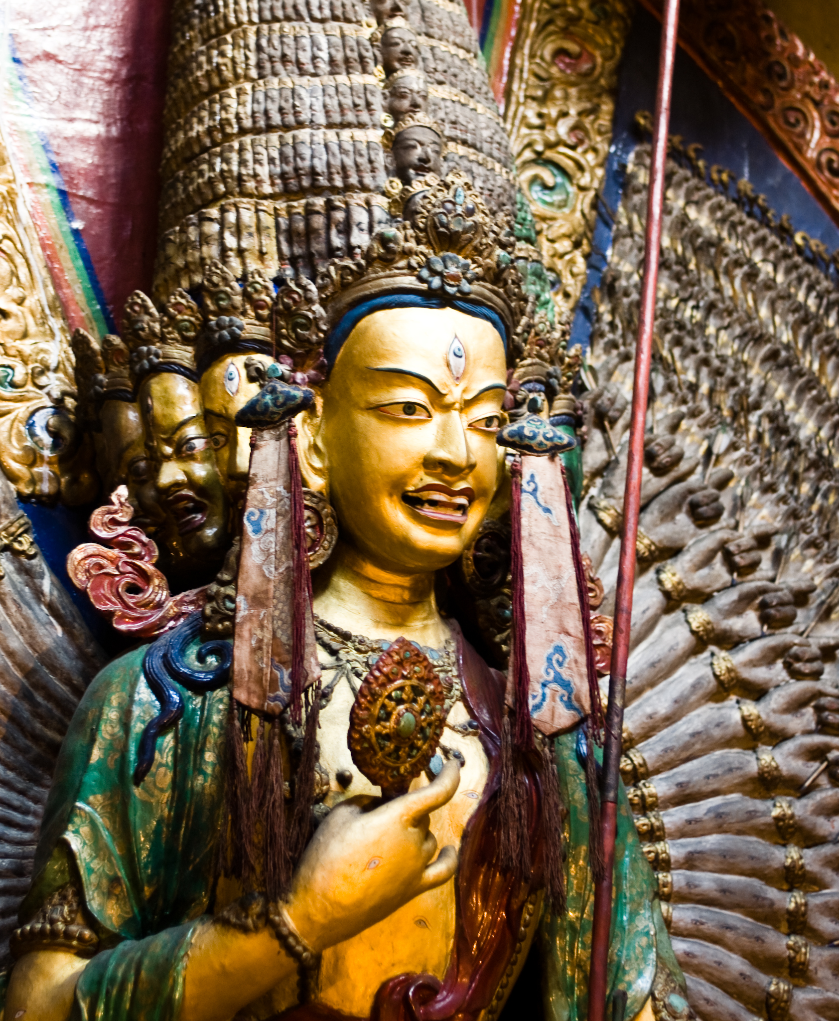 Statue of Sitatapatra. Leh, Ladakh.